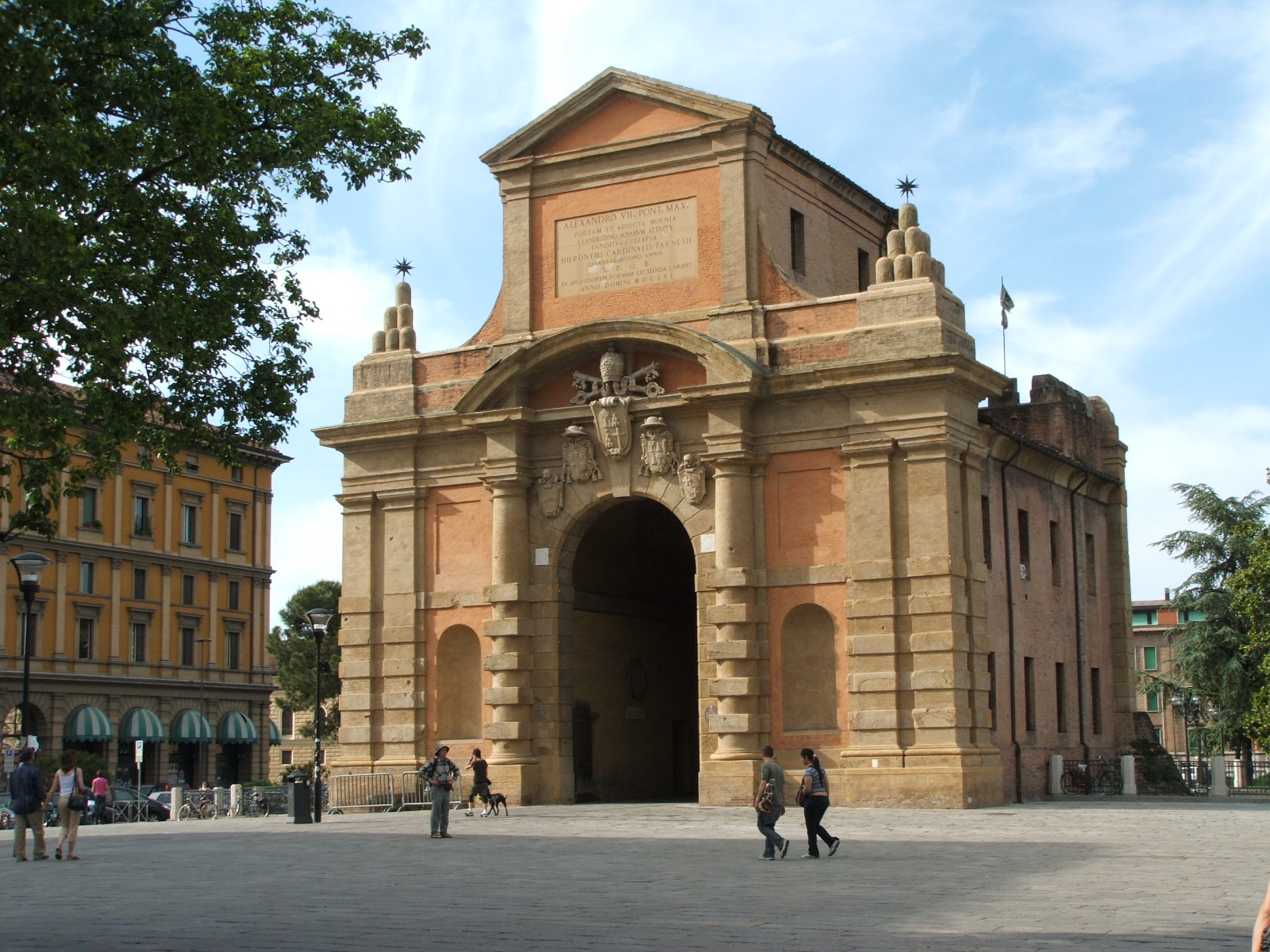 Porta Galliera a Bologna.